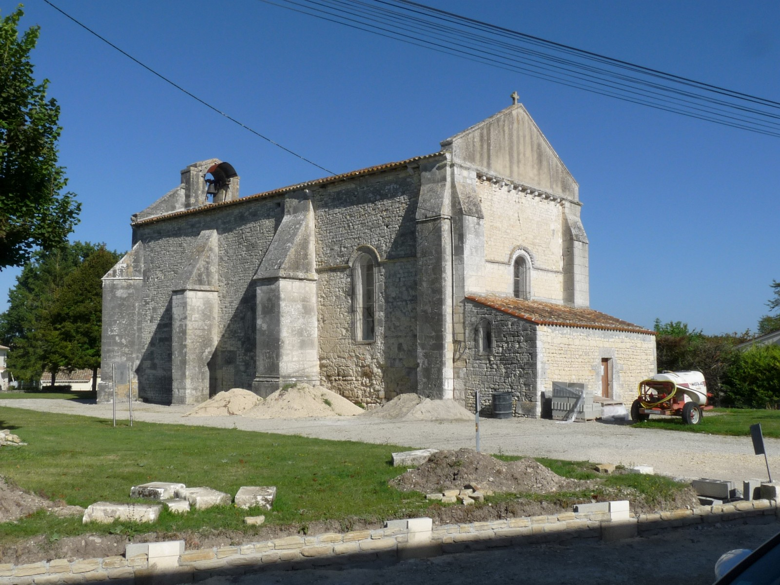 Eglise Notre-Dame de Cierzac, Charente-Maritime, France